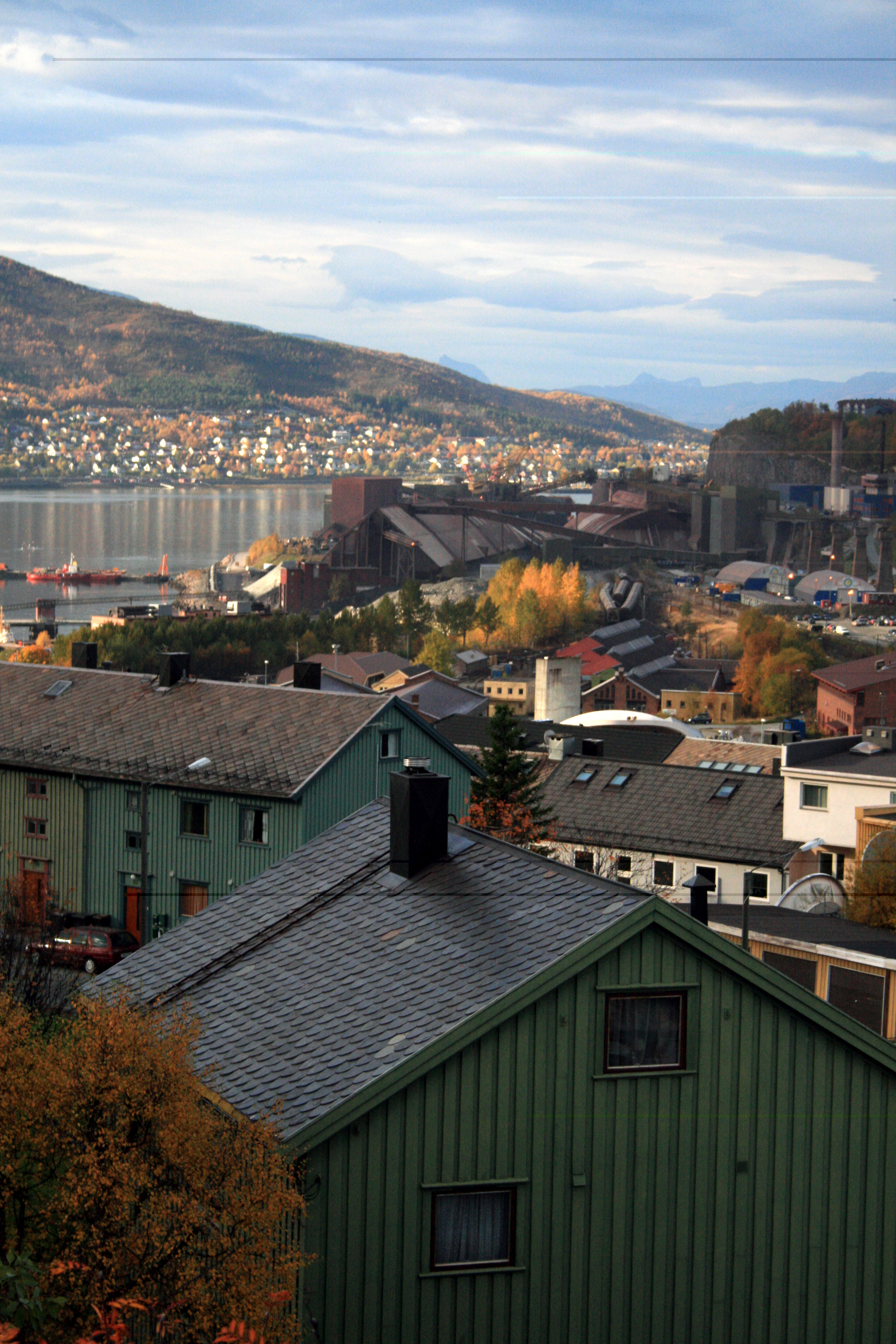 Narvik